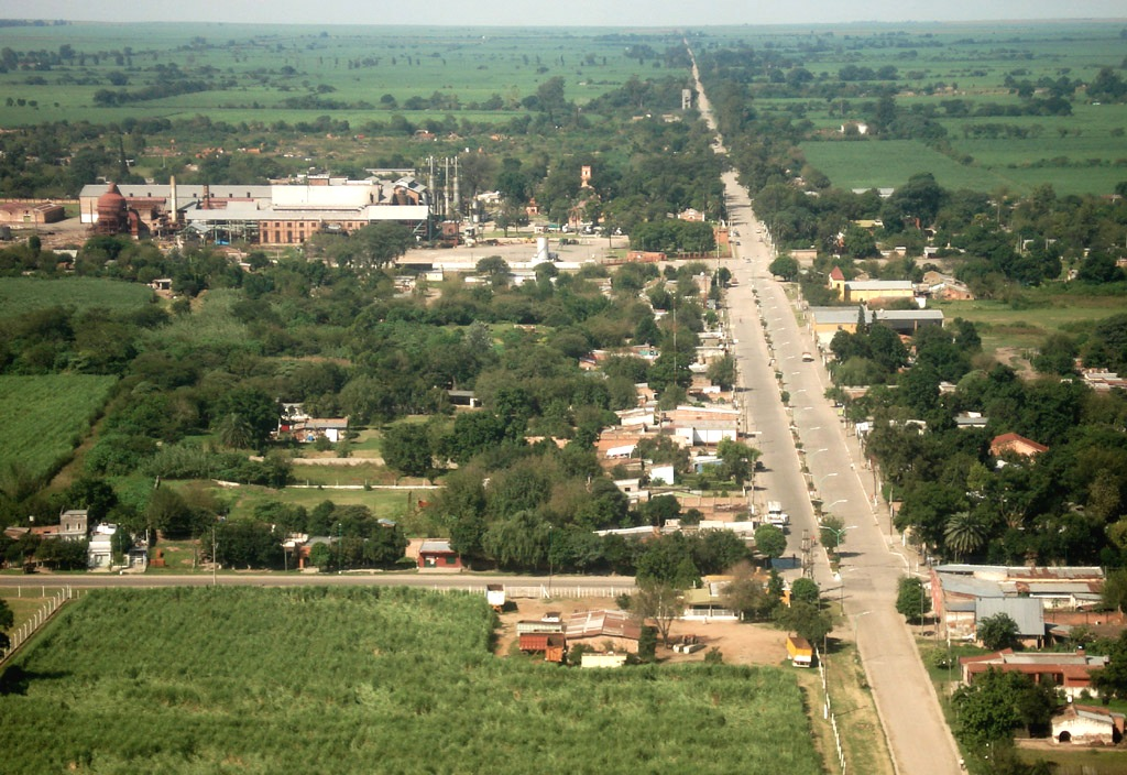 Vista aérea de La Florida, Departamento Cruz Alta, Tucumán.